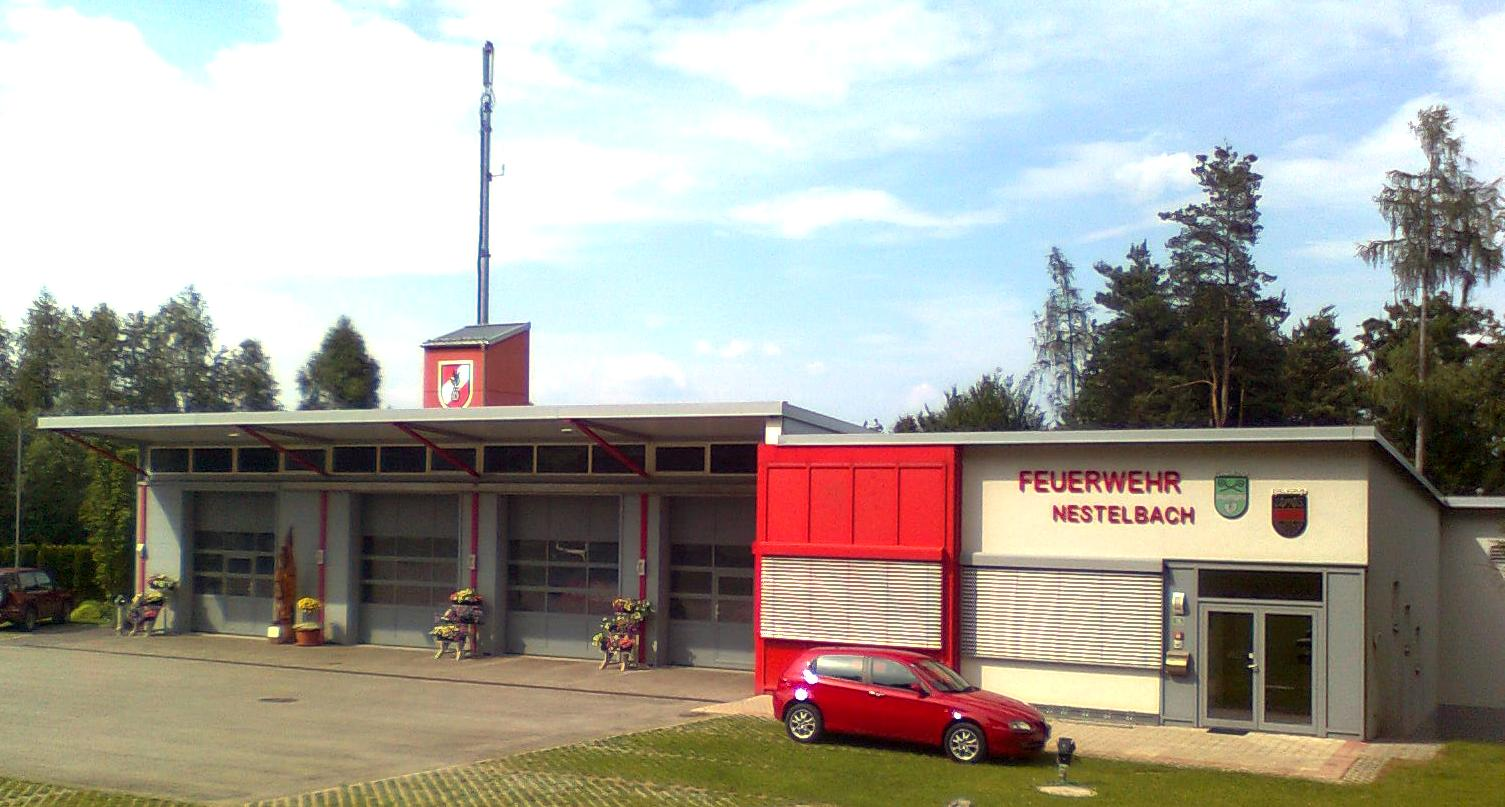 Rüsthaus der Freiwilligen Feuerwehr Nestelbach bei Graz